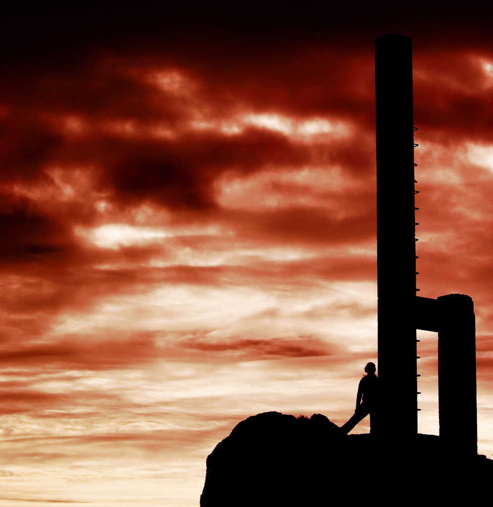 Cruceiro, Cabo Prior, A Coruña, Galiza'Cabo Prior'